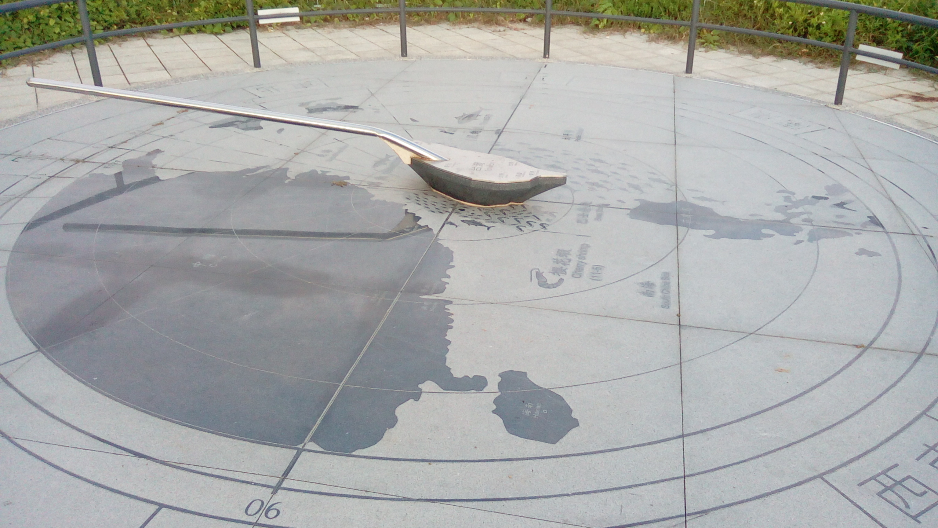 湯匙象徵台灣為亞洲的金湯匙之意